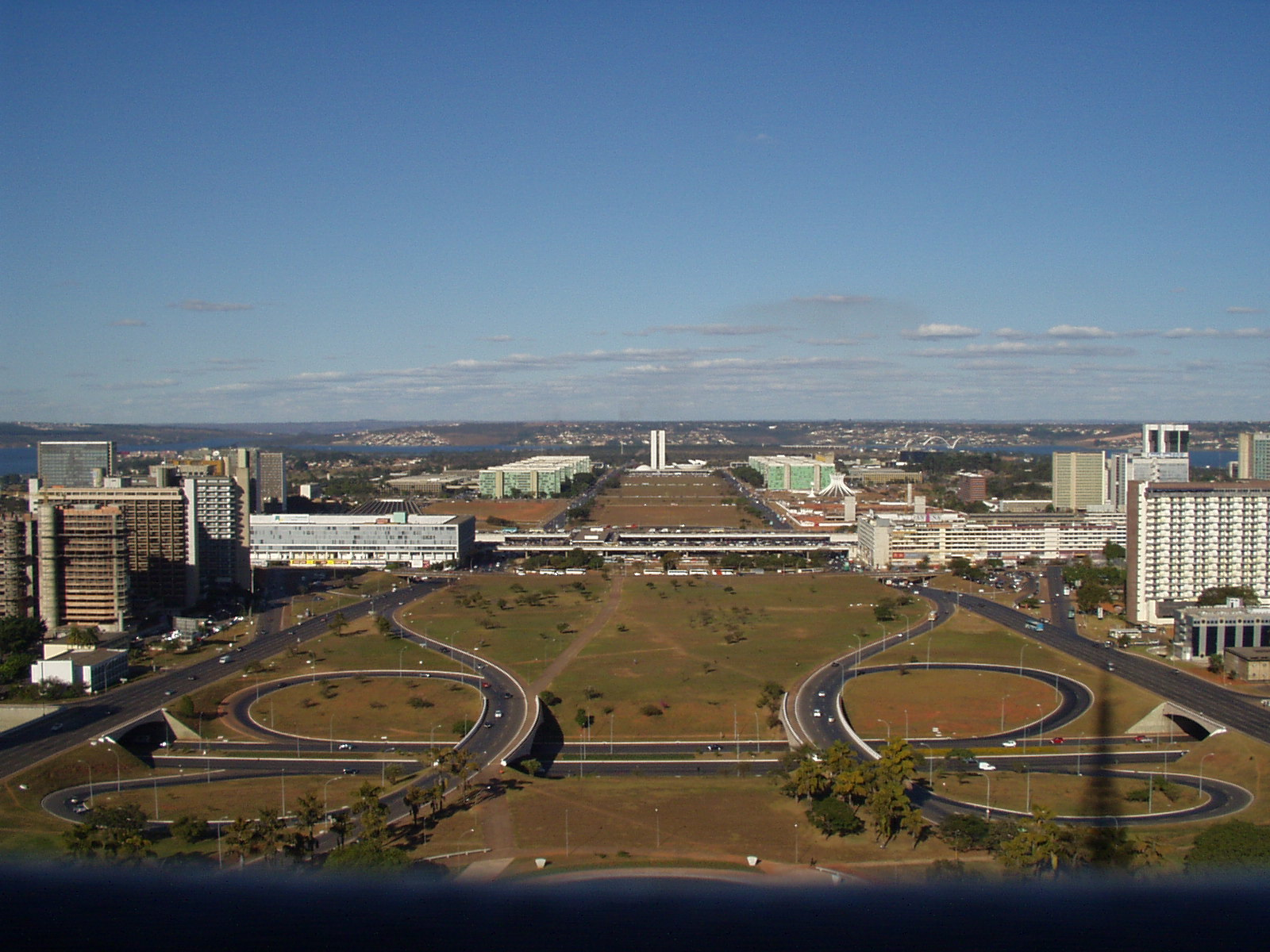 Le grand axe de l'organisation de Brasilia (Brésil). Au loin, l'esplanade des ministères et le Parlement